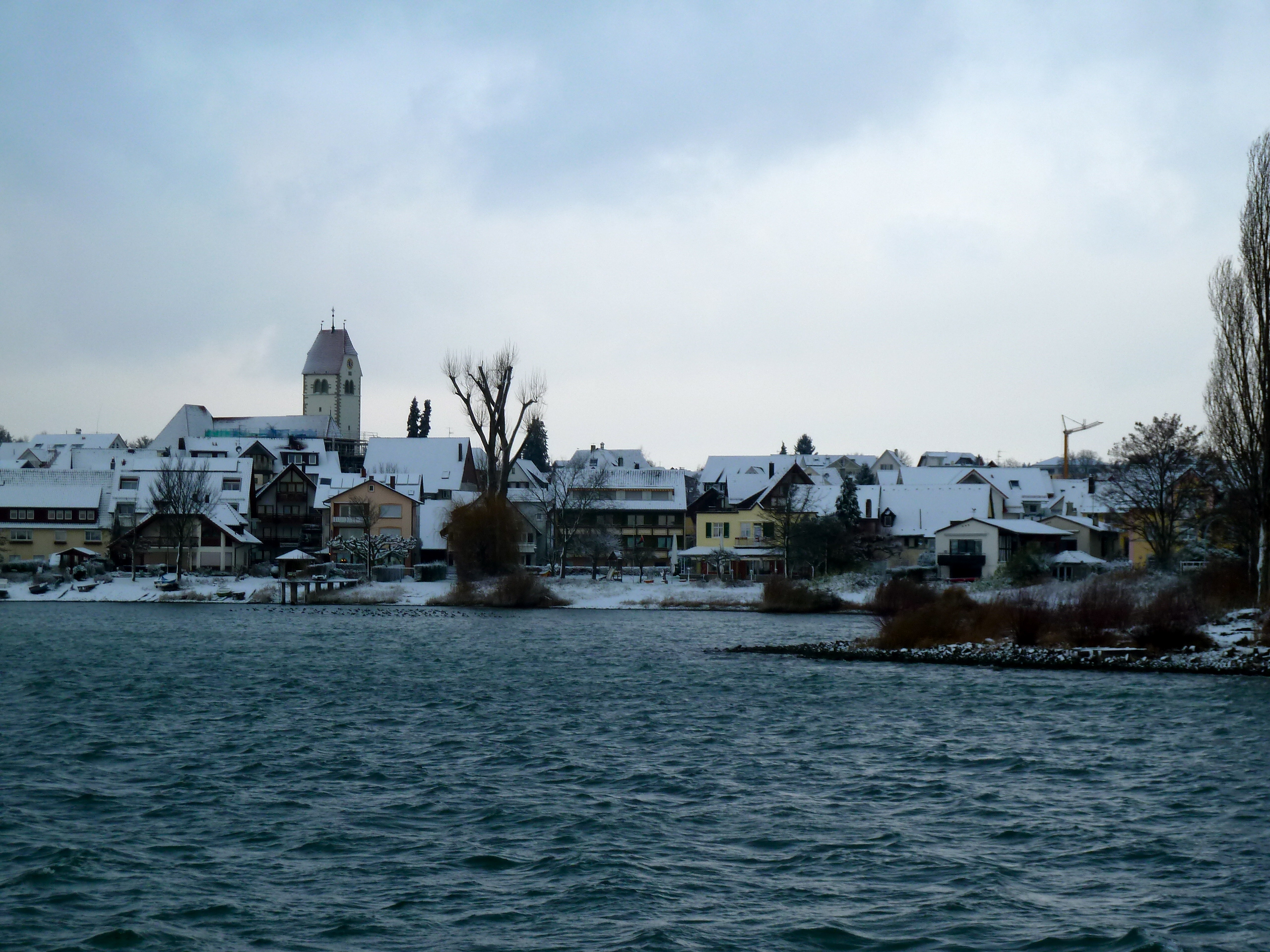 Blick vom Landesteg zur Pfarrkirche St. Jodokus